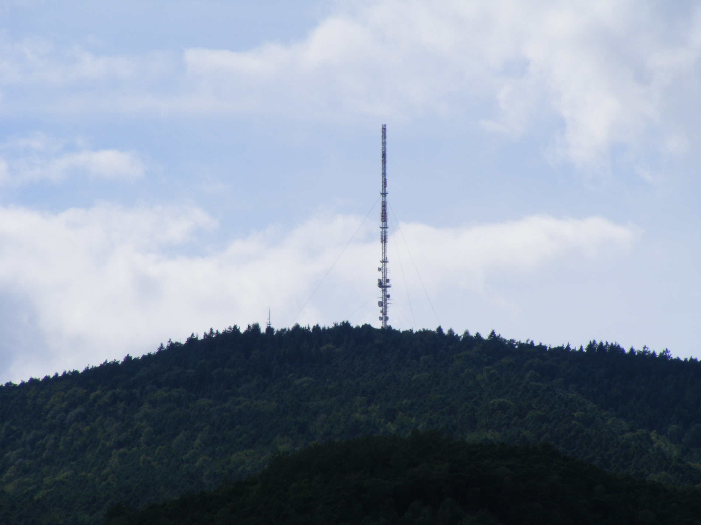 Weinbiet mit dem Sender Weinbiet von Mußbach aus